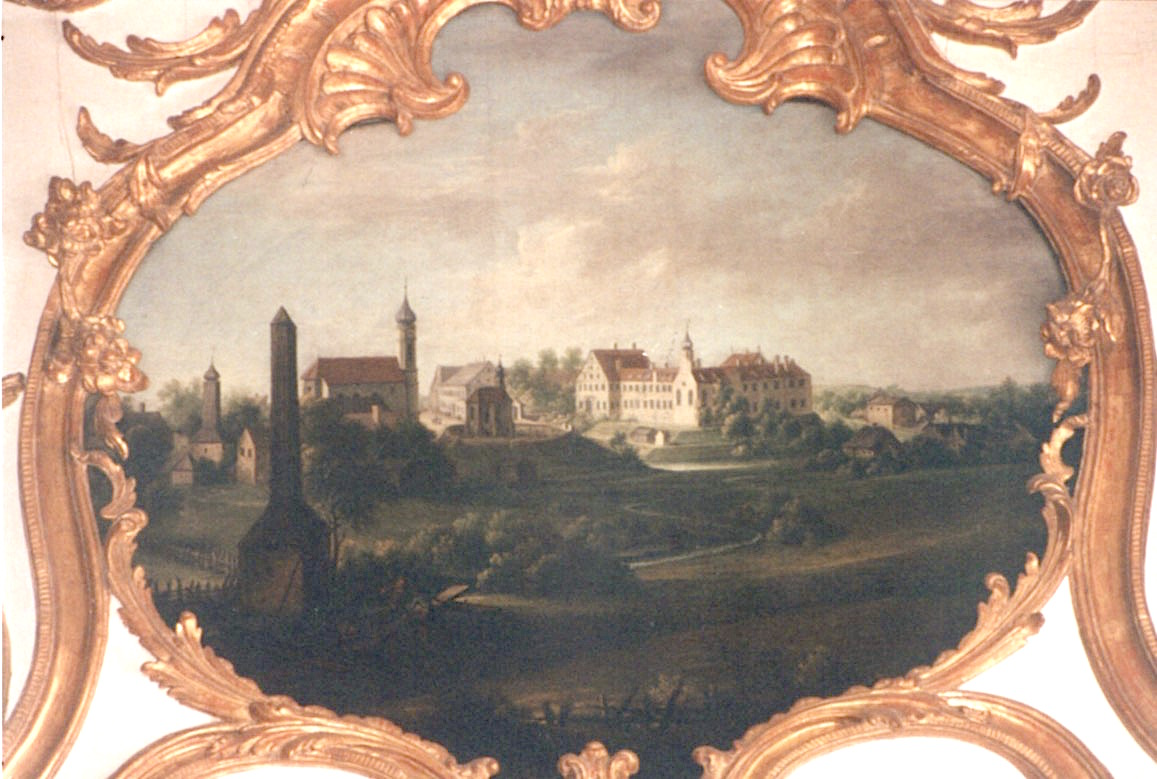 Schloss Schwaben anno 1765 Deckengemälde in der Residenz München